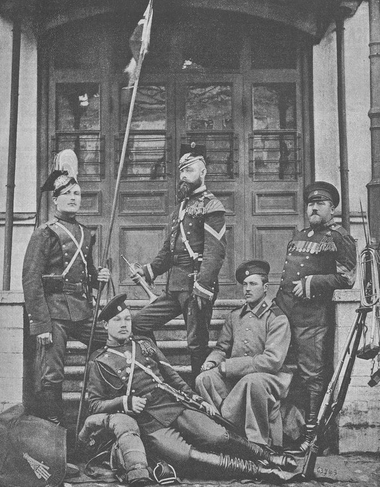 Лейб-уланы, 26-го мая 1894-го года